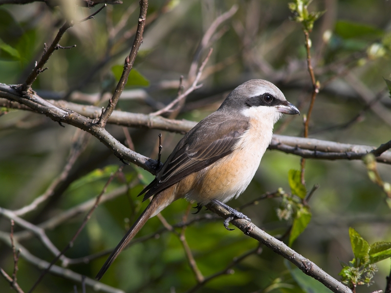 Lanius cristatus 紅尾伯勞